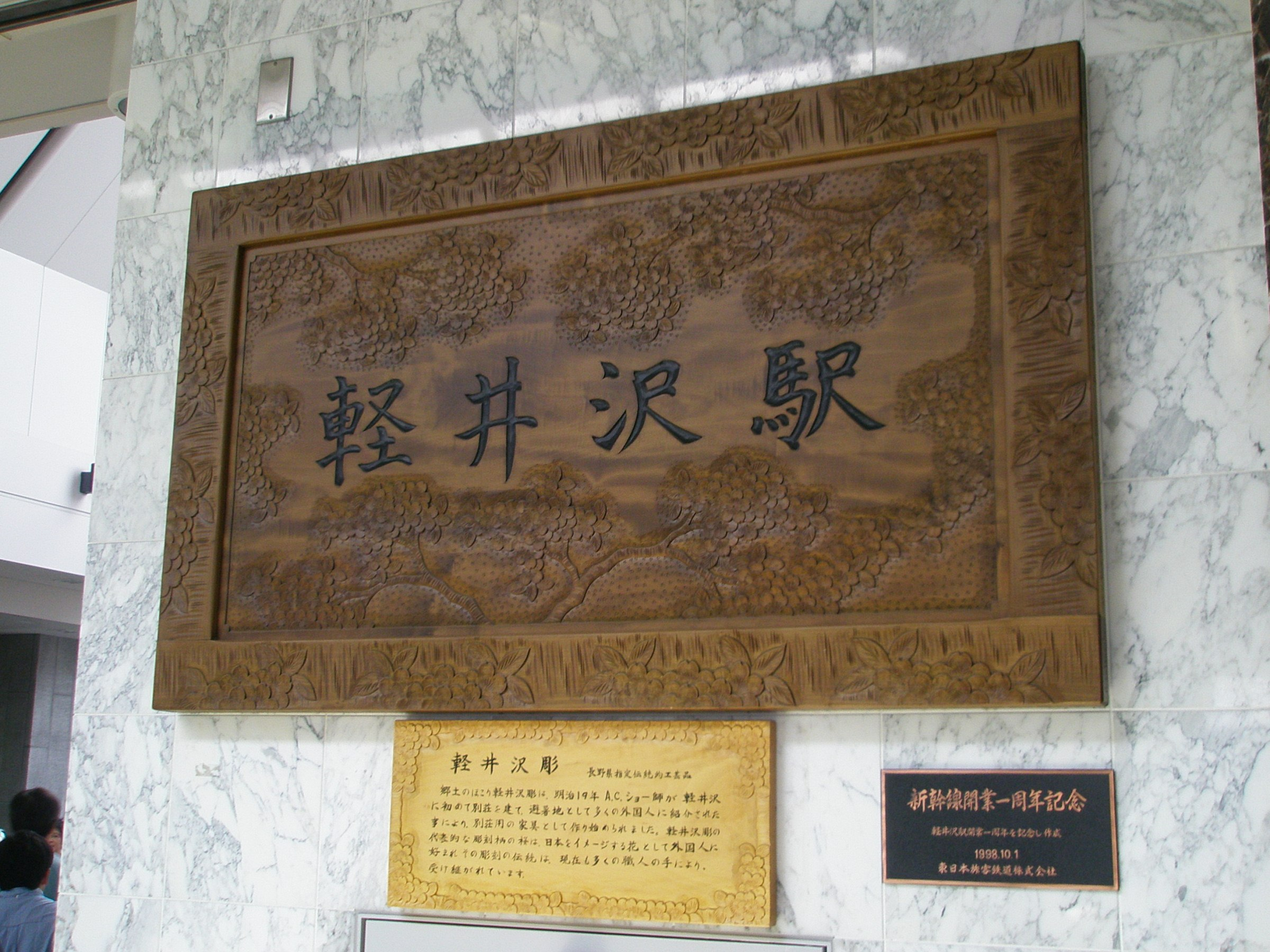 軽井沢彫の軽井沢駅銘板